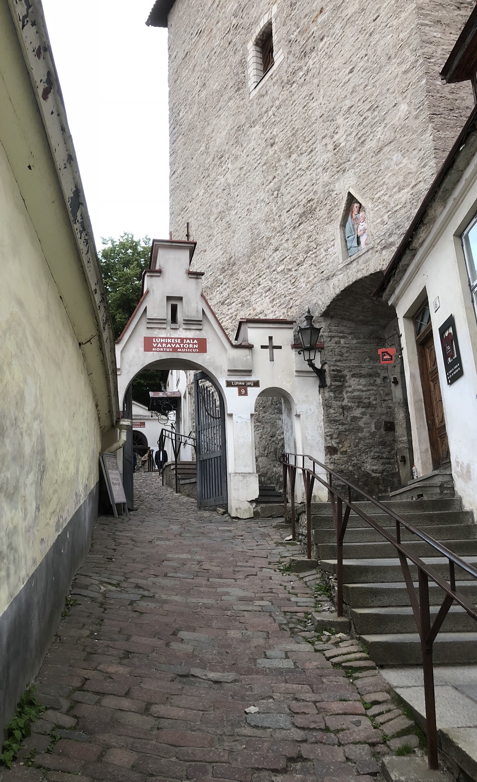 Oberes Ende des Kurzen Dombergs